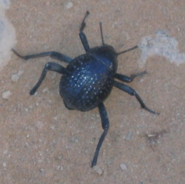 Onymacris rugatipennis?, Dünenkäfer, Sossusvlei, Namibia